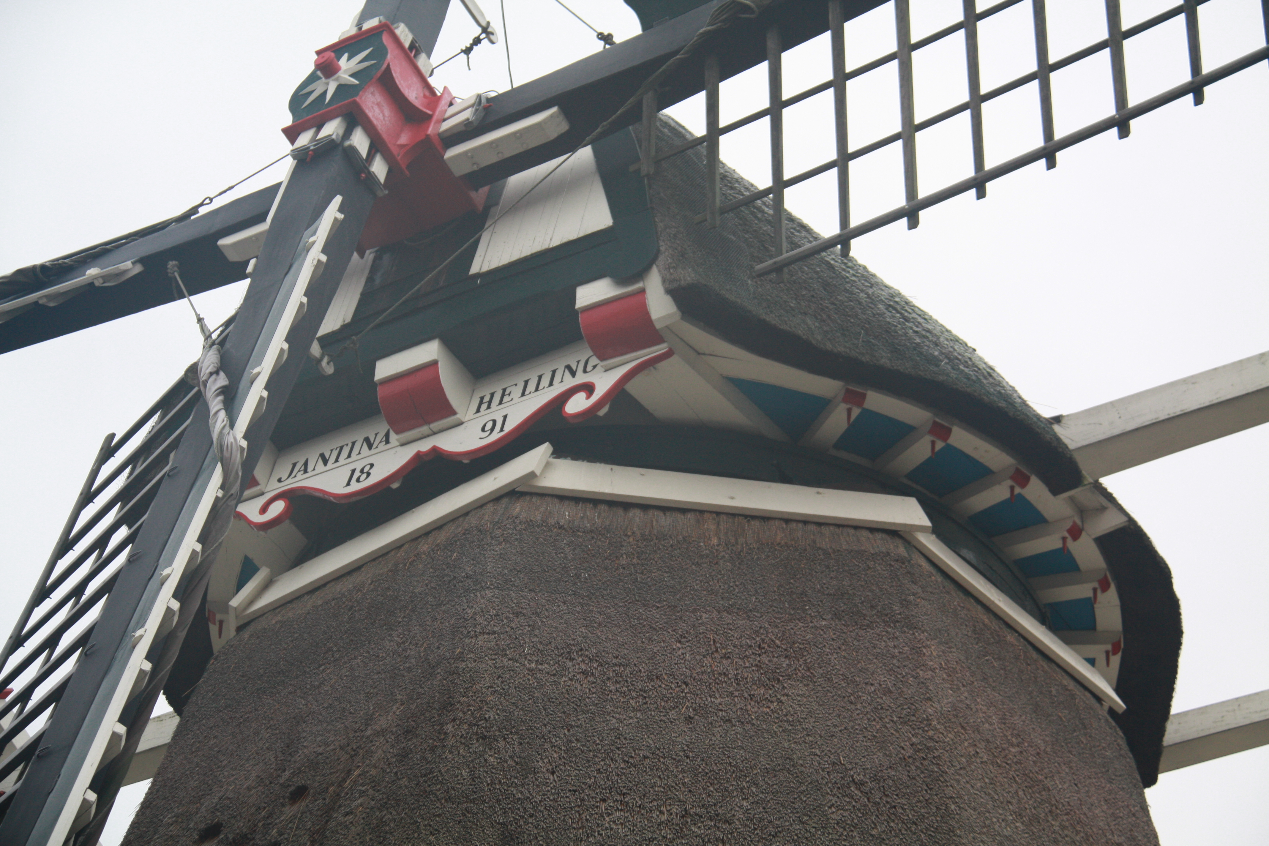 Jantina Hellingmolen